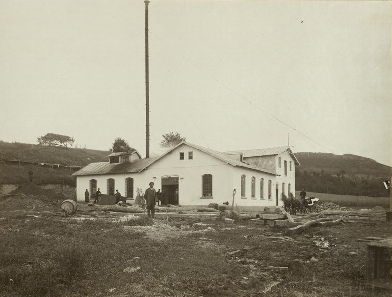 Фабрика за аби, шалове, гайтани, пояси и др. на Семов & Георгиев в Габрово. Фотоалбум с фотографии на български индустриални предприятия от периода 1887-1912 г., подарен от Съюза на българските индустриалци на цар Фердинанд І по случай 25-годишнината от възшествието му на българския престол.